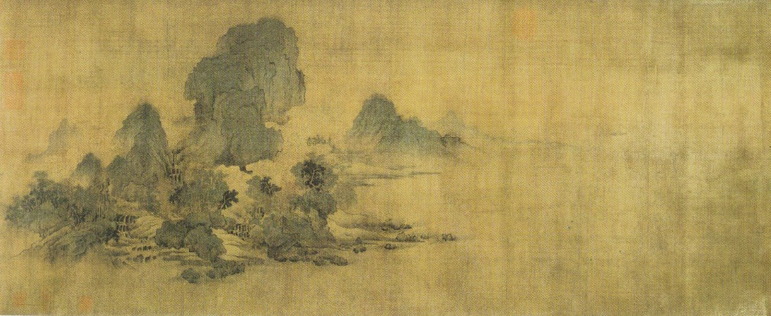 Monts en rangs serrés au dessus d'une rivière embrumée par le peintre chinois Wang Shen. XIe siècle. Section d'un rouleau portatif, encre et couleurs sur soie, vers 1100. 45,2X166 cm. Musée de Shanghai.